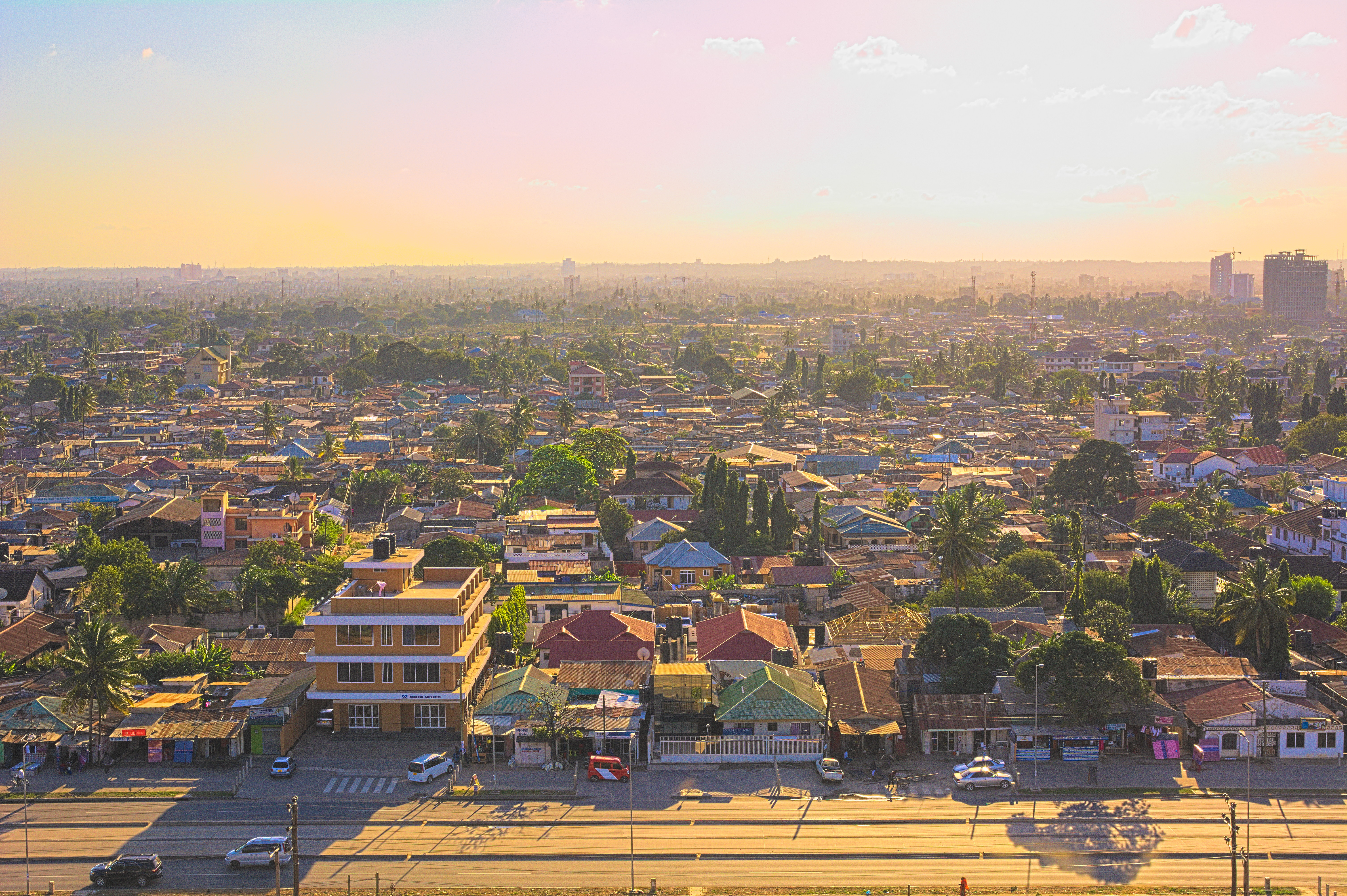 Dar es Salaam, Tanzania